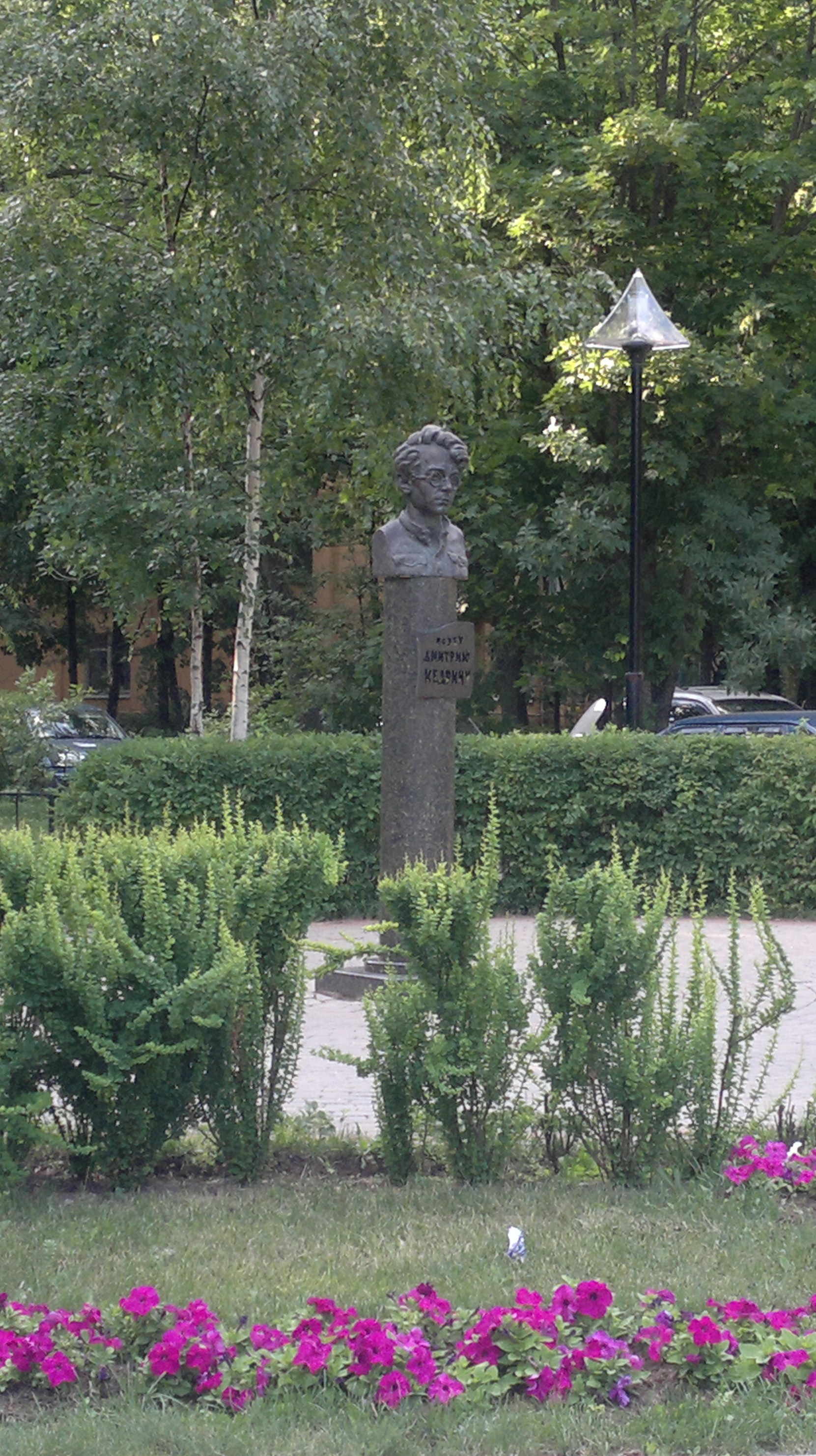 Памятник Дмитрию Кедрину установленный в Мытищах на улице Лётной